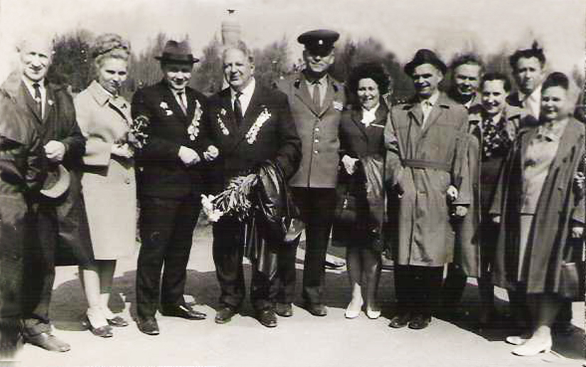 Л. М. Предтеченская с однополчанами. 9 мая 1965 г.